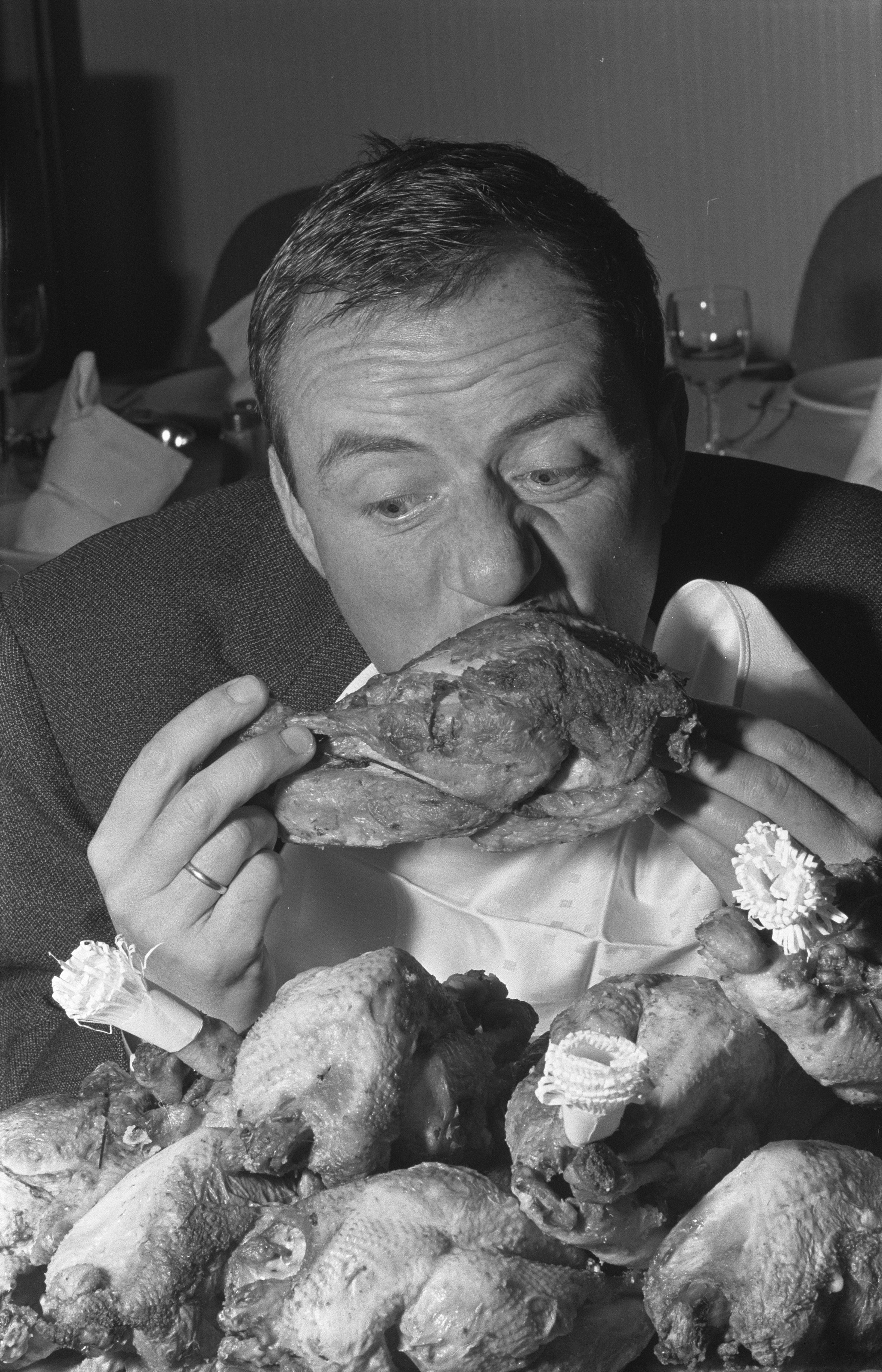 Collectie / Archief : Fotocollectie Anefo Reportage / Serie : [ onbekend ] Beschrijving : Opening restaurant in het hotel Pont d'Avignon te Amsterdam, Johnny Kraaijkamp tijdens het kip eten Datum : 11 november 1959 Locatie : Amsterdam, Noord-Holland Trefwoorden : hotels, restaurants Persoonsnaam : Kraaijkamp, Johnny (sr.) Fotograaf : Pot, Harry / Anefo, [onbekend] Auteursrechthebbende : Nationaal Archief Materiaalsoort : Negatief (zwart/wit) Nummer archiefinventaris : bekijk toegang 2.24.01.05 Bestanddeelnummer : 910-8138